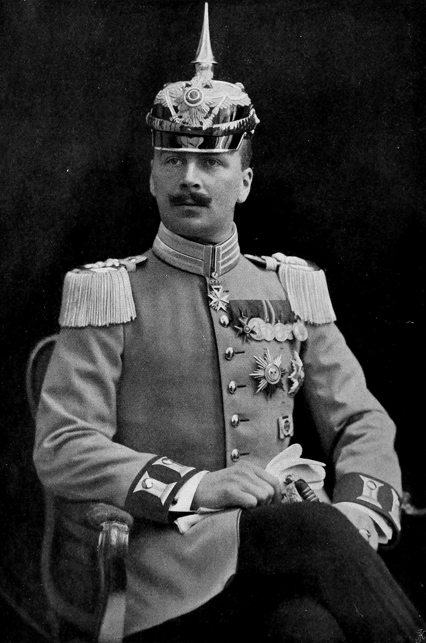 Adolf Friedrich of Mecklenburg (vor 1910)